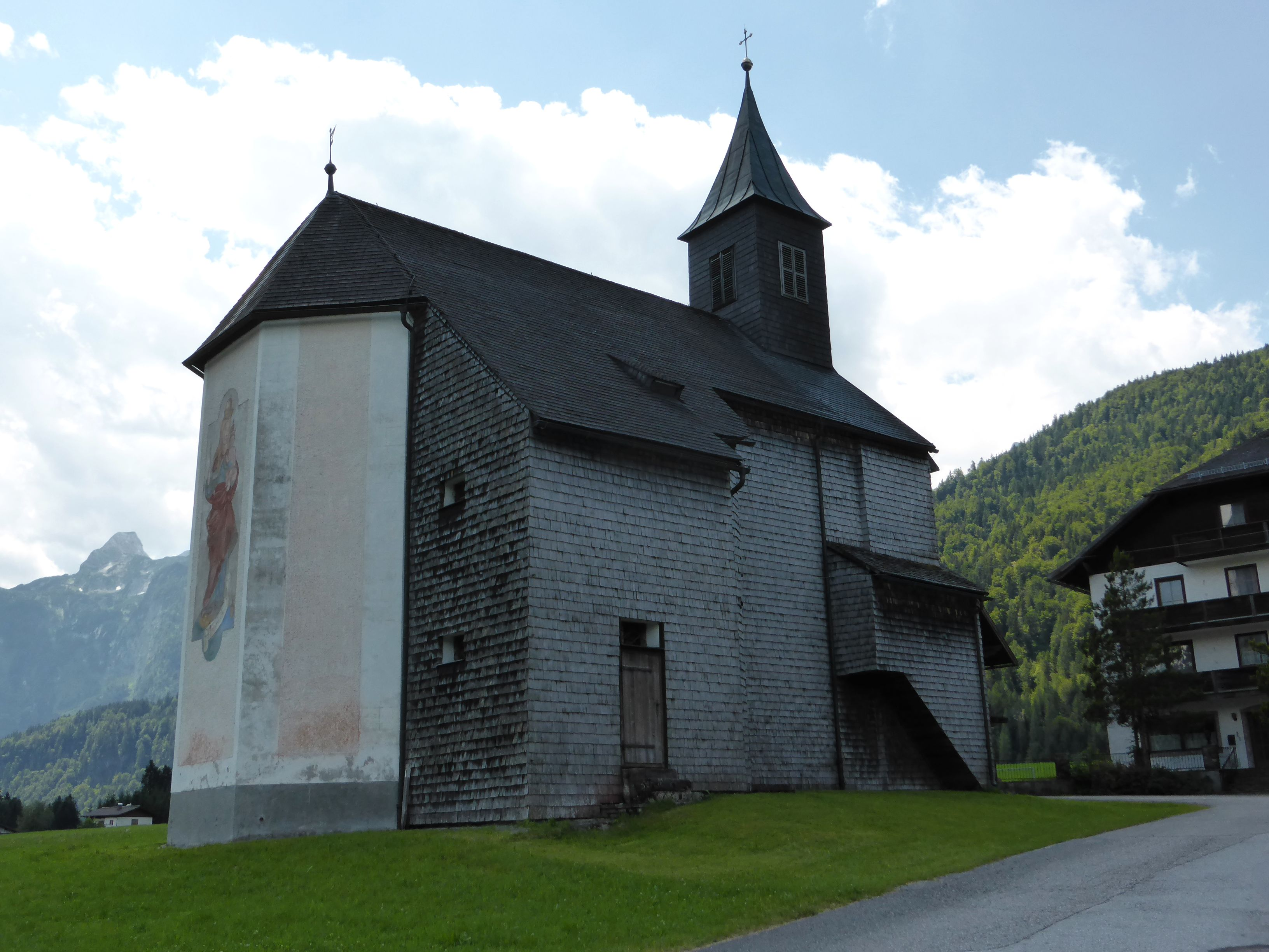 Kath. Filialkirche hl. Maria - Mühlrain